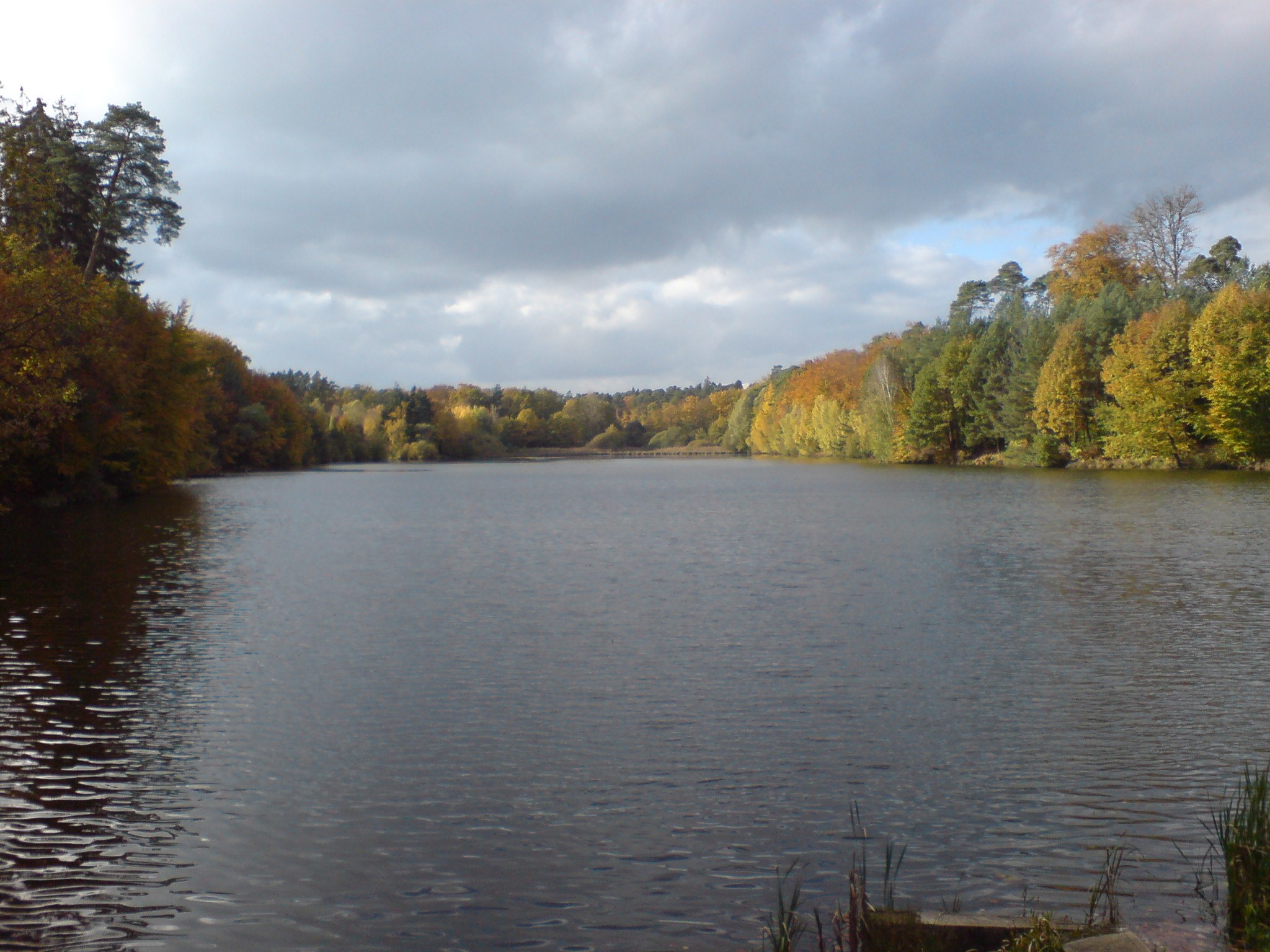 Möhlwoog bei Jägersburg (Homburg Saar)